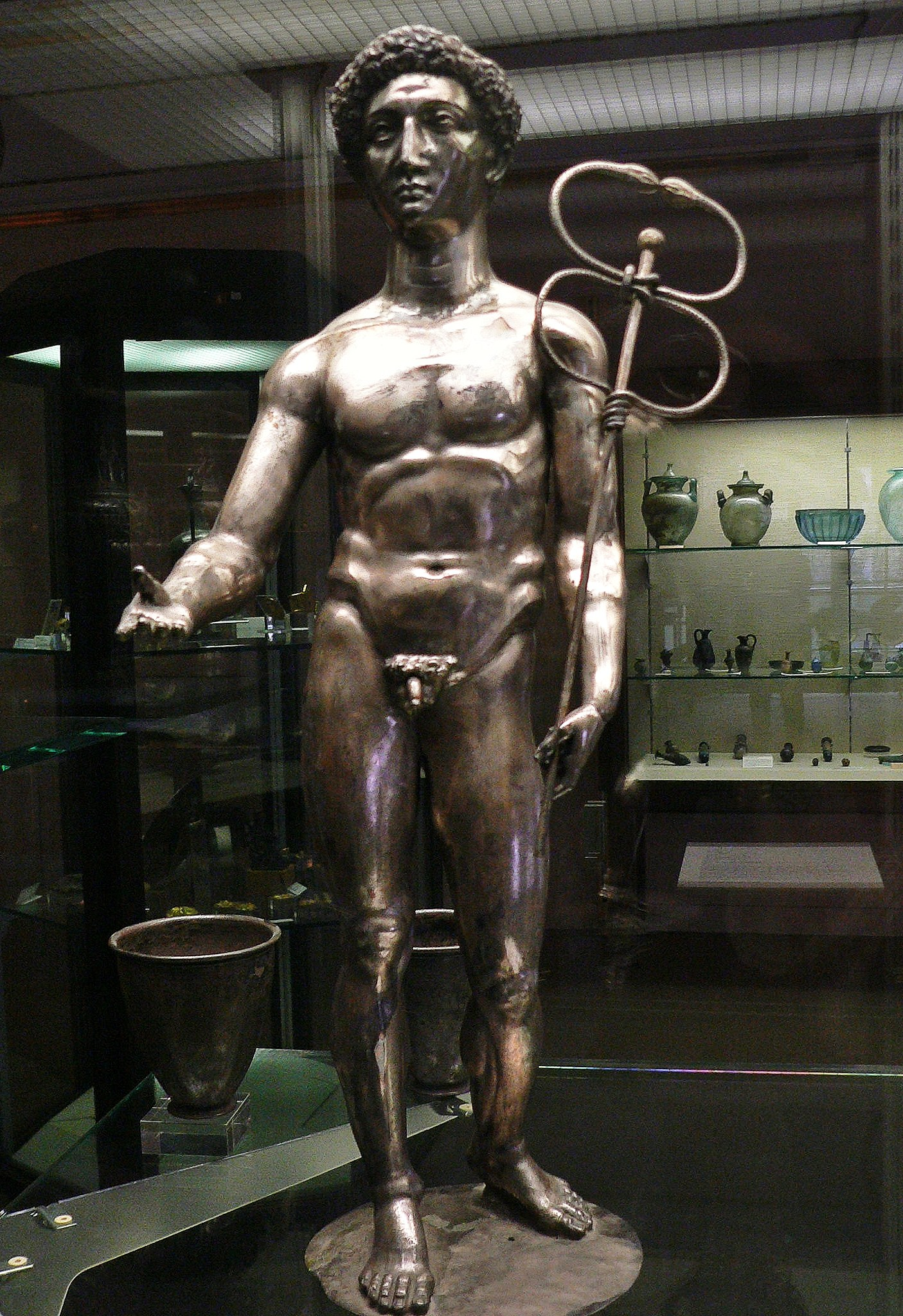 Statuette de Mercure, argent. Trésor de Berthouville